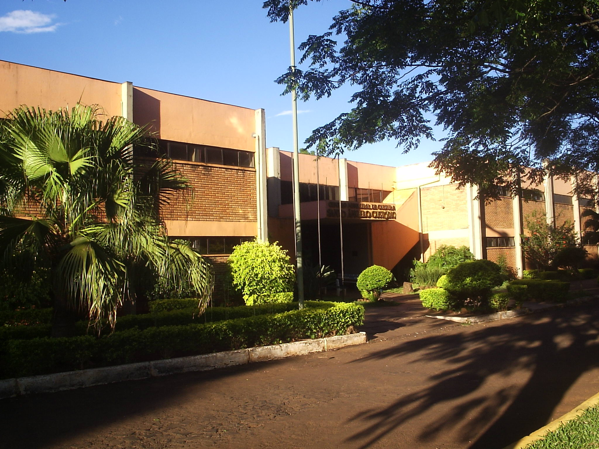 Centro Municipal de Cultura de Santo Ângelo, Rio Grande do Sul.